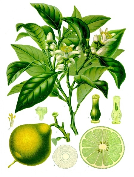 Bergamotte. A Blütenzweig. B Frucht, nahzu reif. C Querschnitt derselben. D Diagramm der Blüte. 1 Kelch ohne Scheibe im Längsschnitt; 2 Staubblätter; 3 Pistill mit Scheibe; 4 dasselbe im Längsschnitt. A B C natürliche Grösse; 1—4 vergrössert.